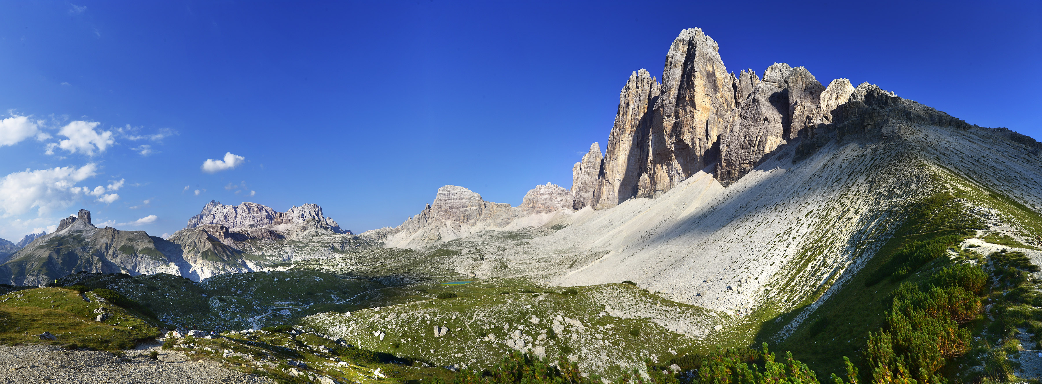 Panoramica delle Tre Cime di Lavaredo